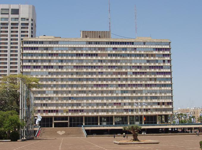 בית עיריית תל אביב. צילם דוד שי